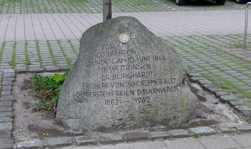 Ein Findling vor dem Wettringer Rathaus erinnert an die Gründung des Westfälischen Bauervereins 1862.